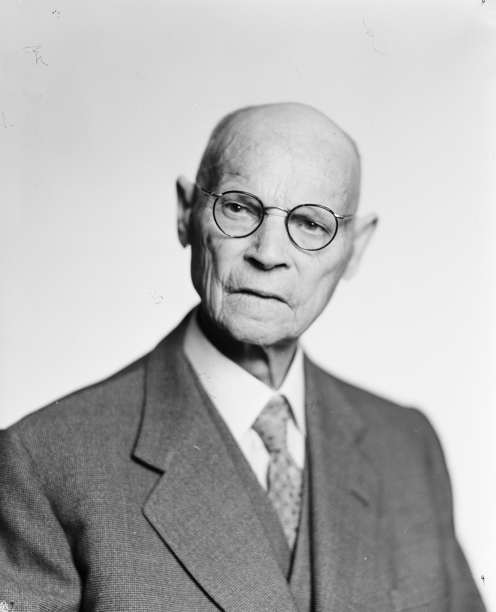 Johannes Arneson var en norsk lærer, skolestyrer og forfatter.